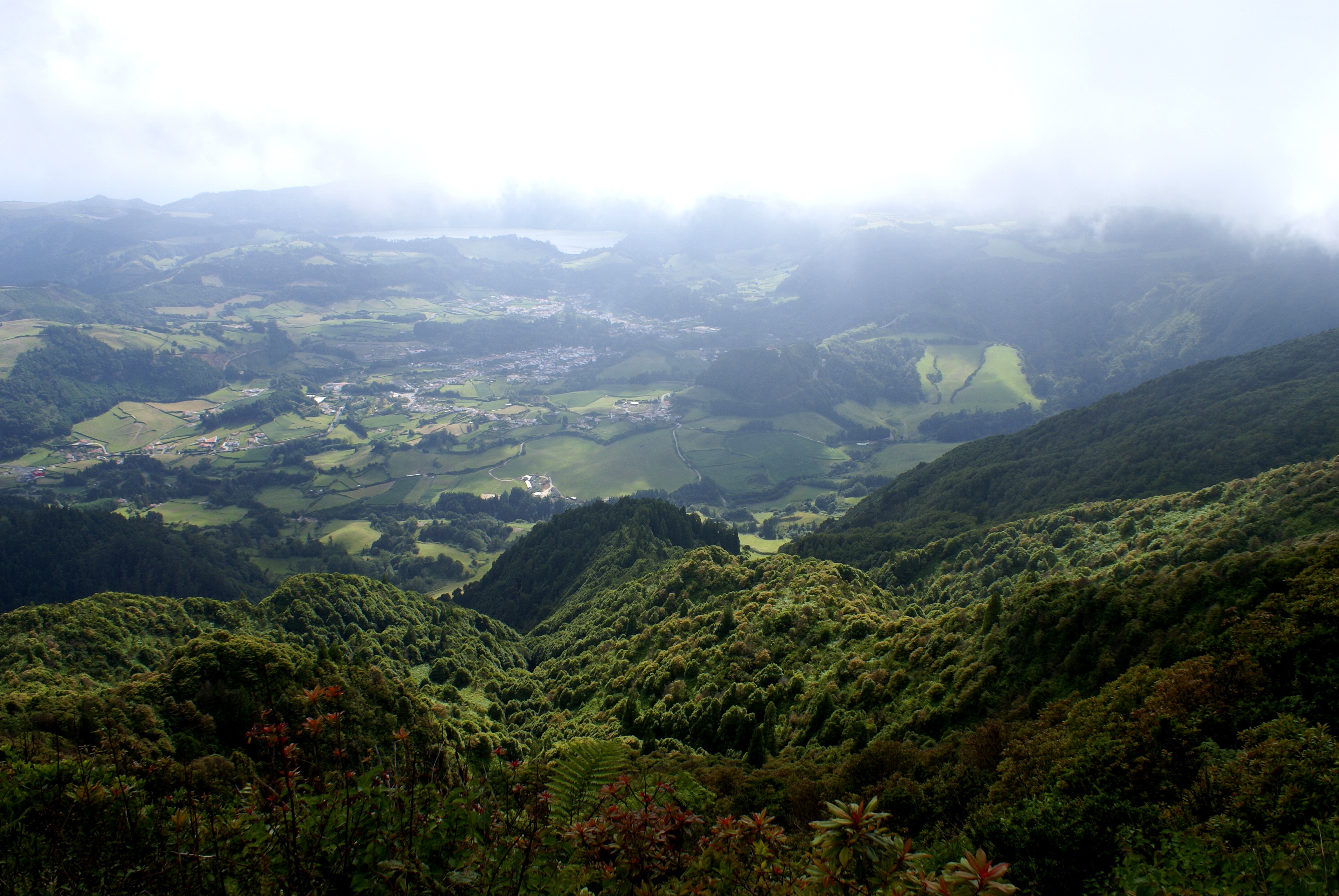 Miradouro do Salto do Cavalo, Povoação, ilha de São Miguel, Açores